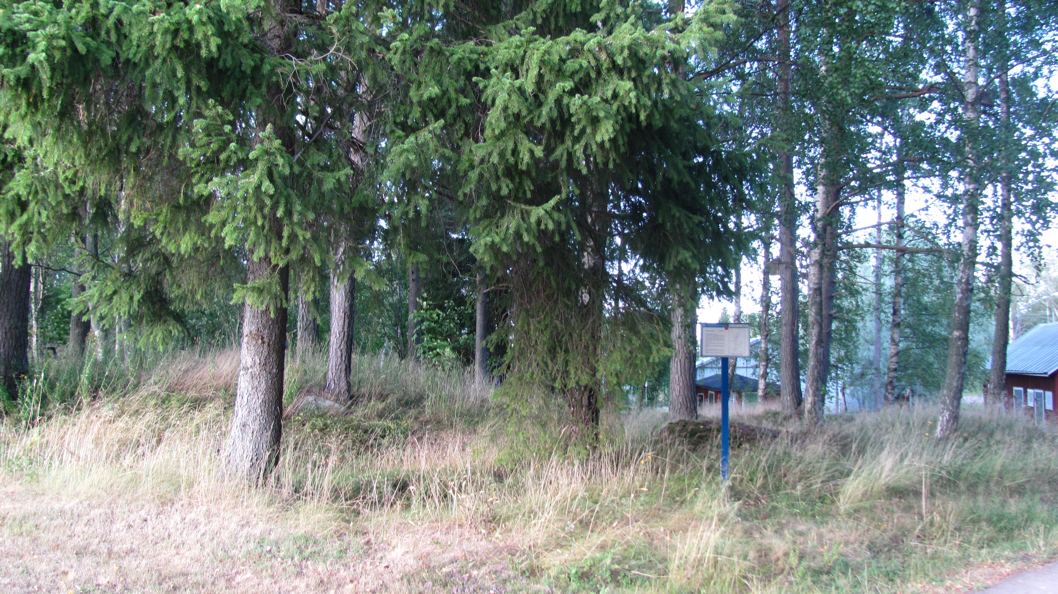 Gräberfeld Ättekullan, Godby, Gemeinde Finström, Fasta Aland, Finnland